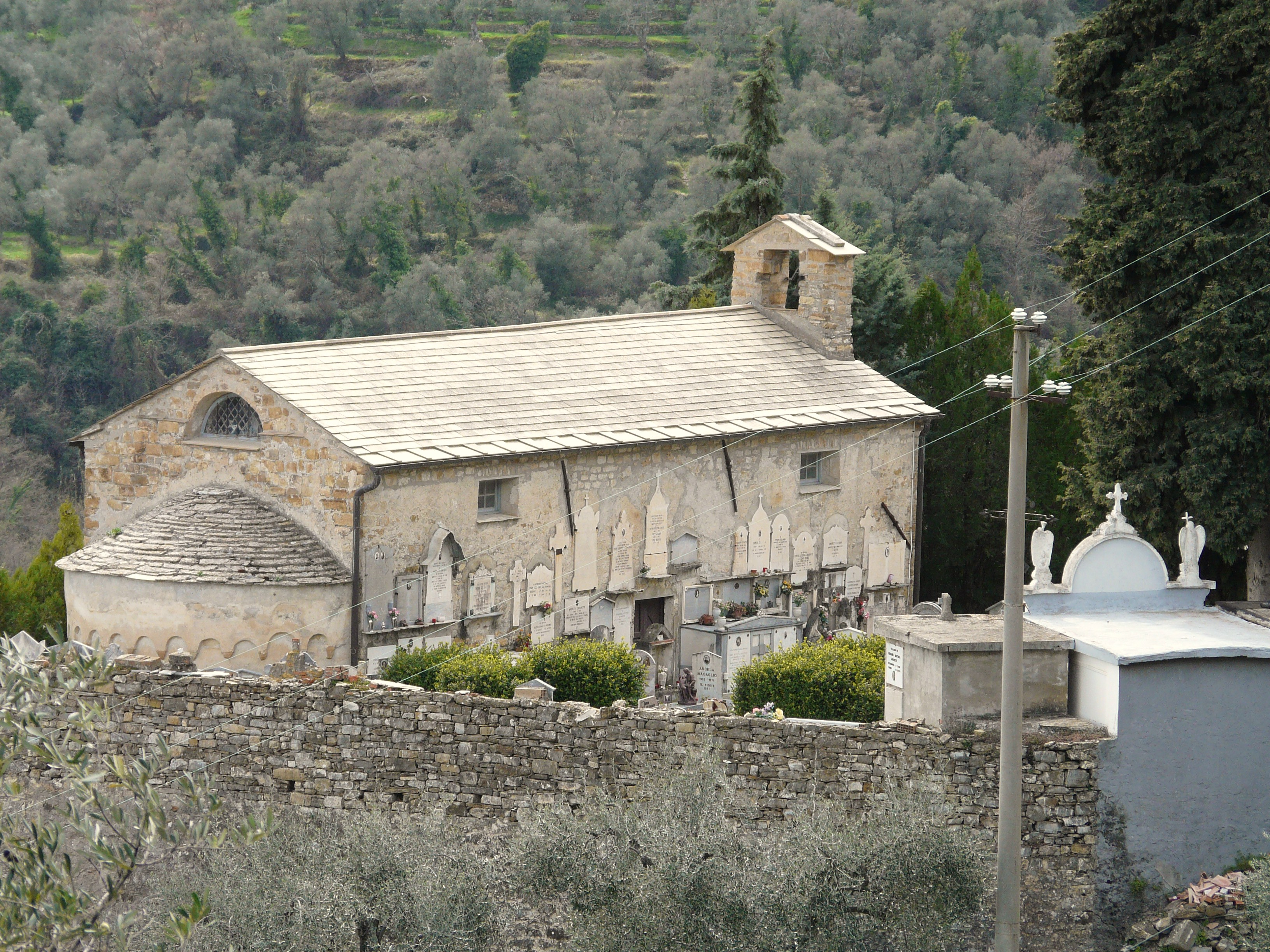 Chiesa di San Gregorio, Pietrabruna, Liguria, Italia